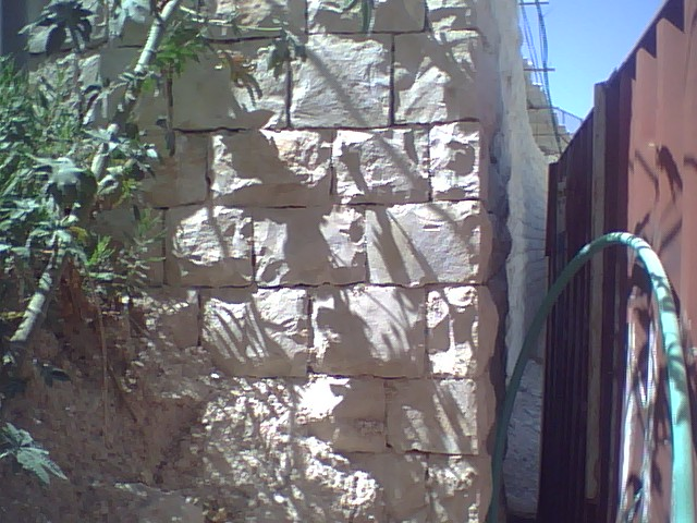 קיר בנוי מאבנים משוקפות , ארנונה ירושלים